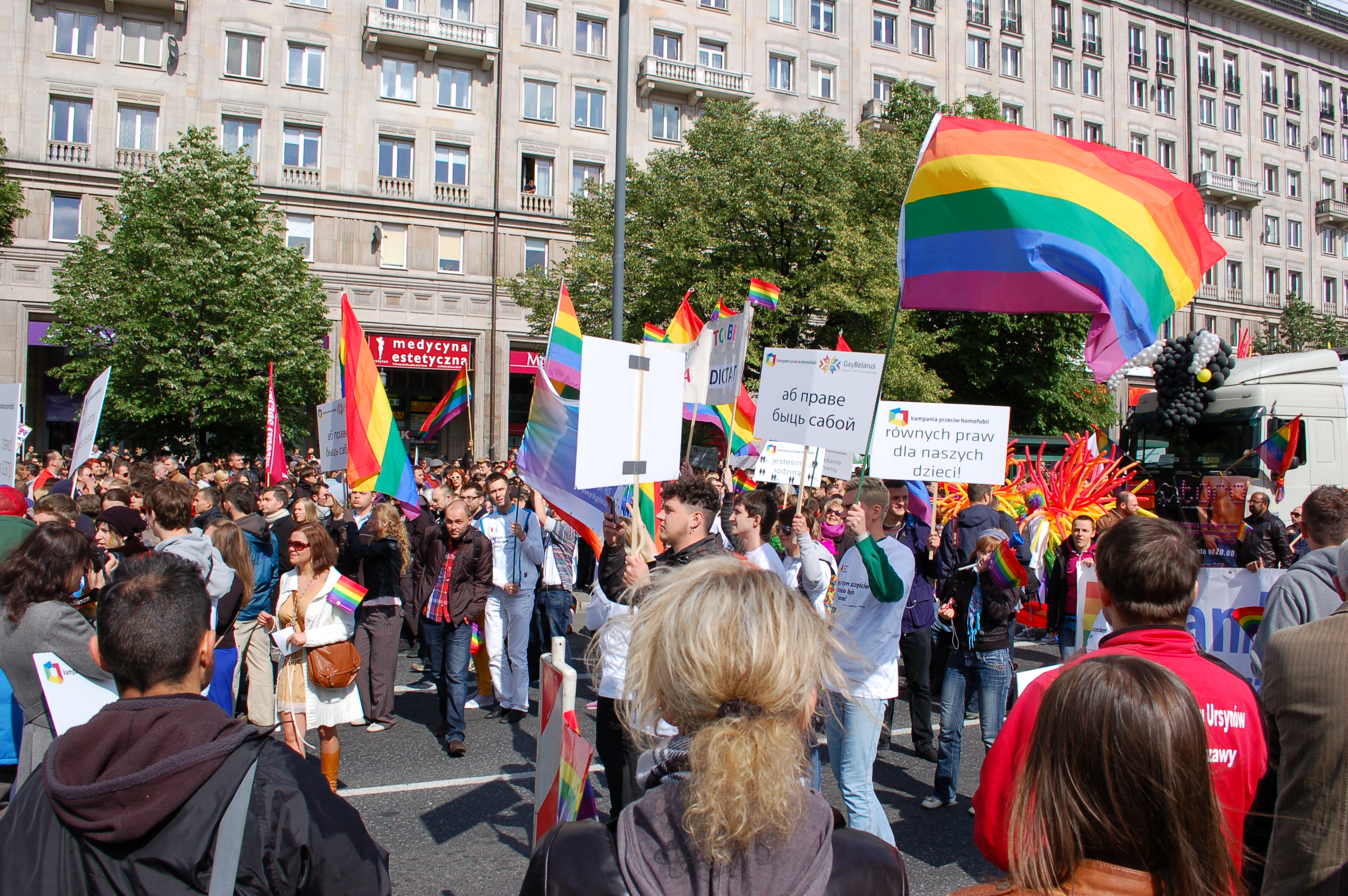 Parada Równości 2012, Warschau